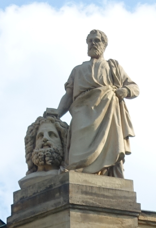 Allegorie der Plastik von Adolf Fremd, 1. Attikafigur (von links) auf dem Portikus des Großen Hauses der Staatstheater Stuttgart, 1912.